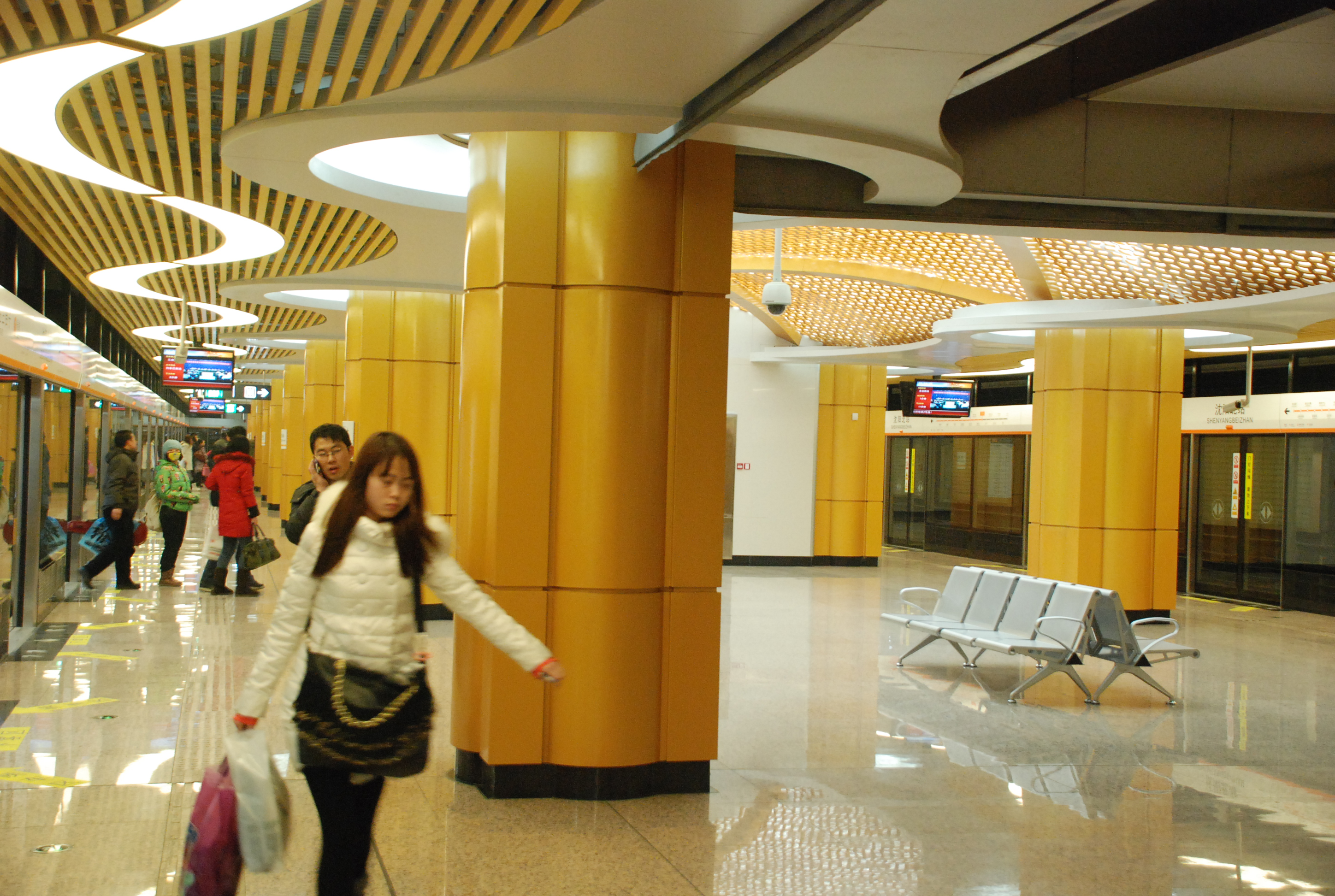 中文（中国大陆）: 沈阳地铁二号线沈阳北站站